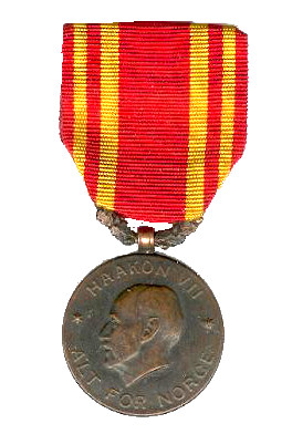 Norwegian War Medal